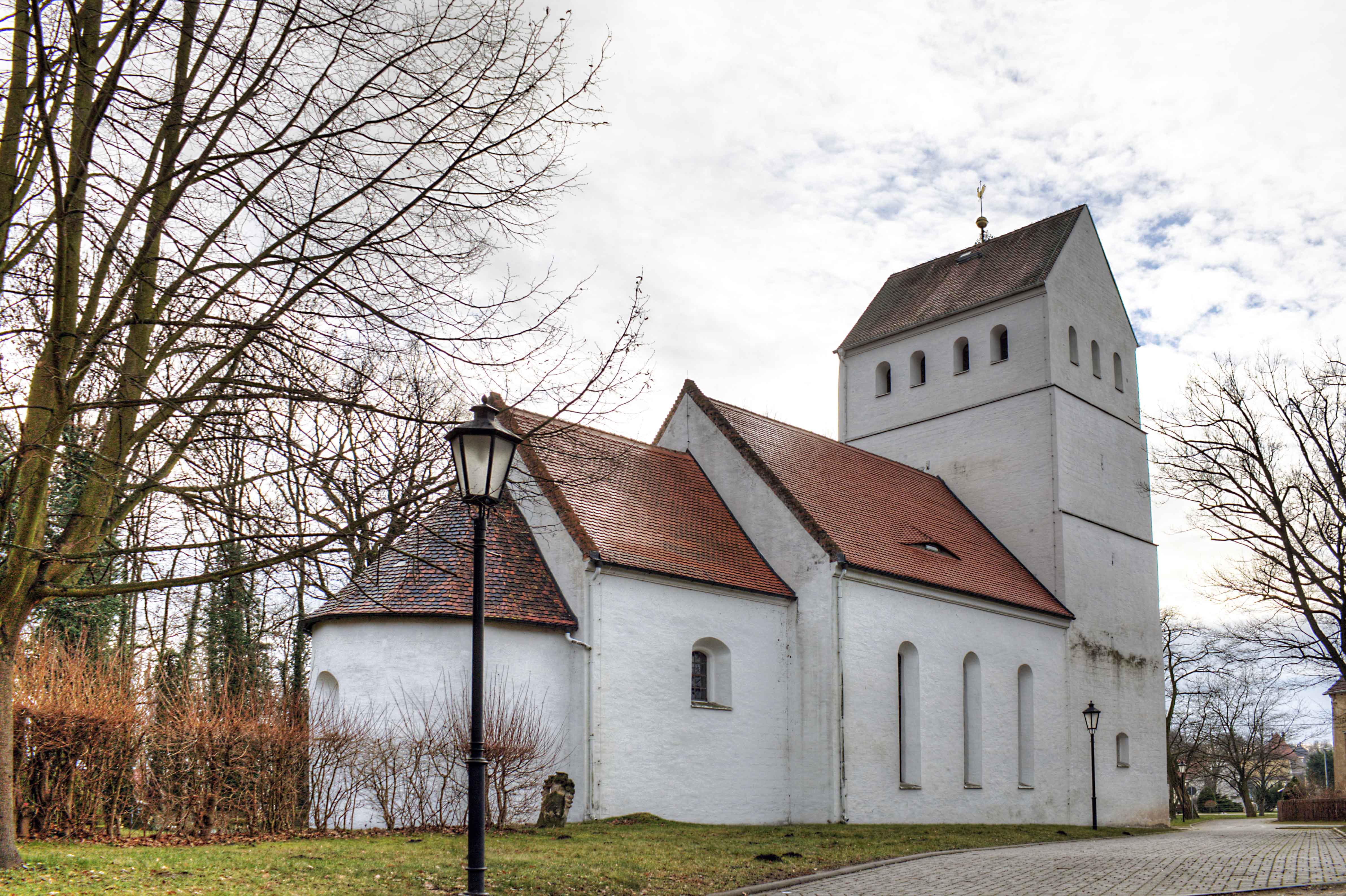 Kirche, Kirchstraße in Cavertitz